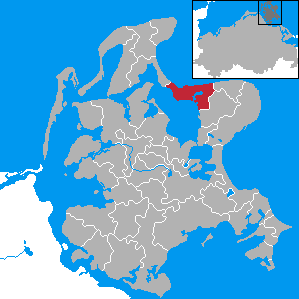 Glowe, Landkreis Rügen, Mecklenburg-Vorpommern